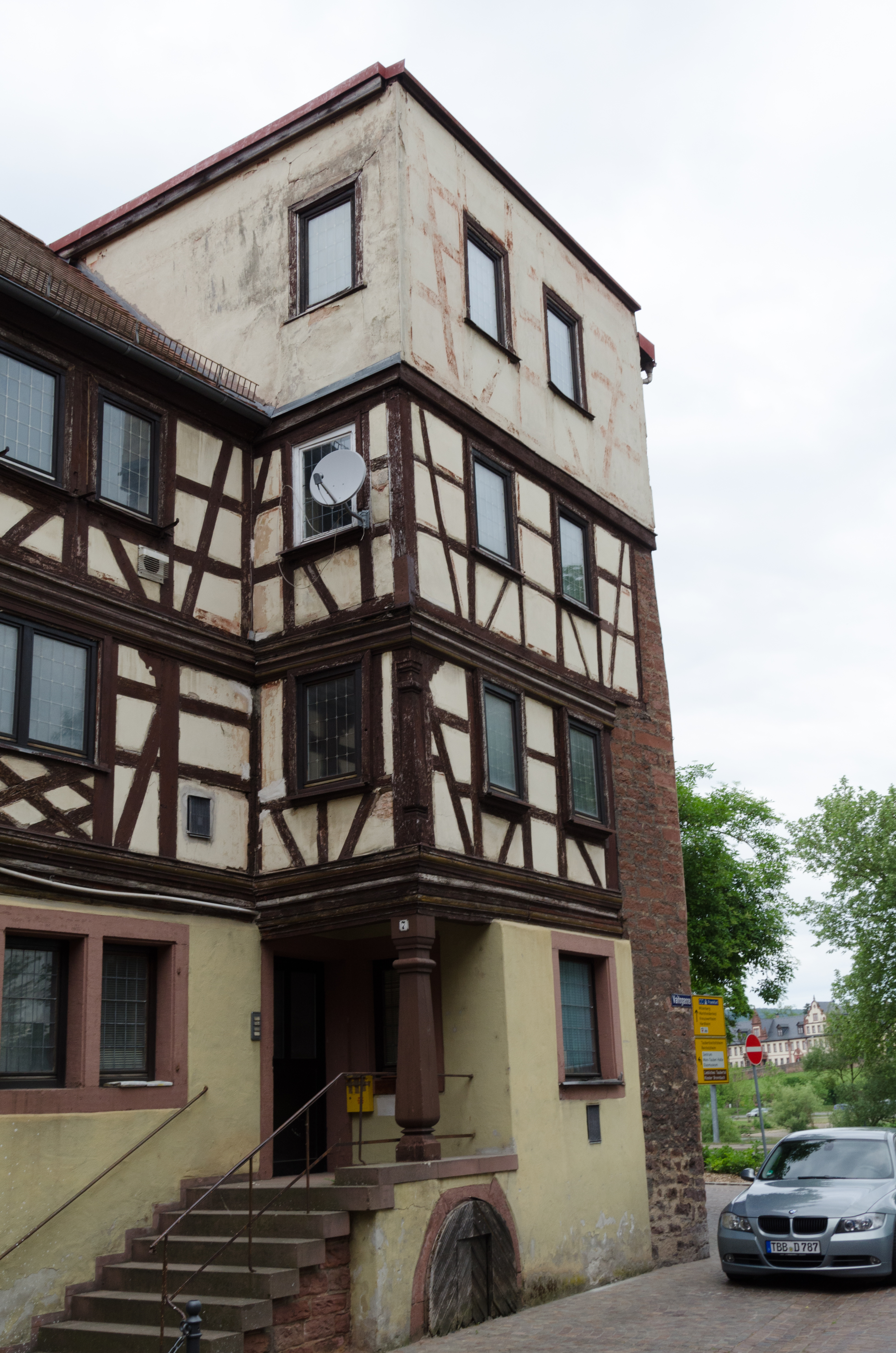 Wertheim, Vaitsgasse 7